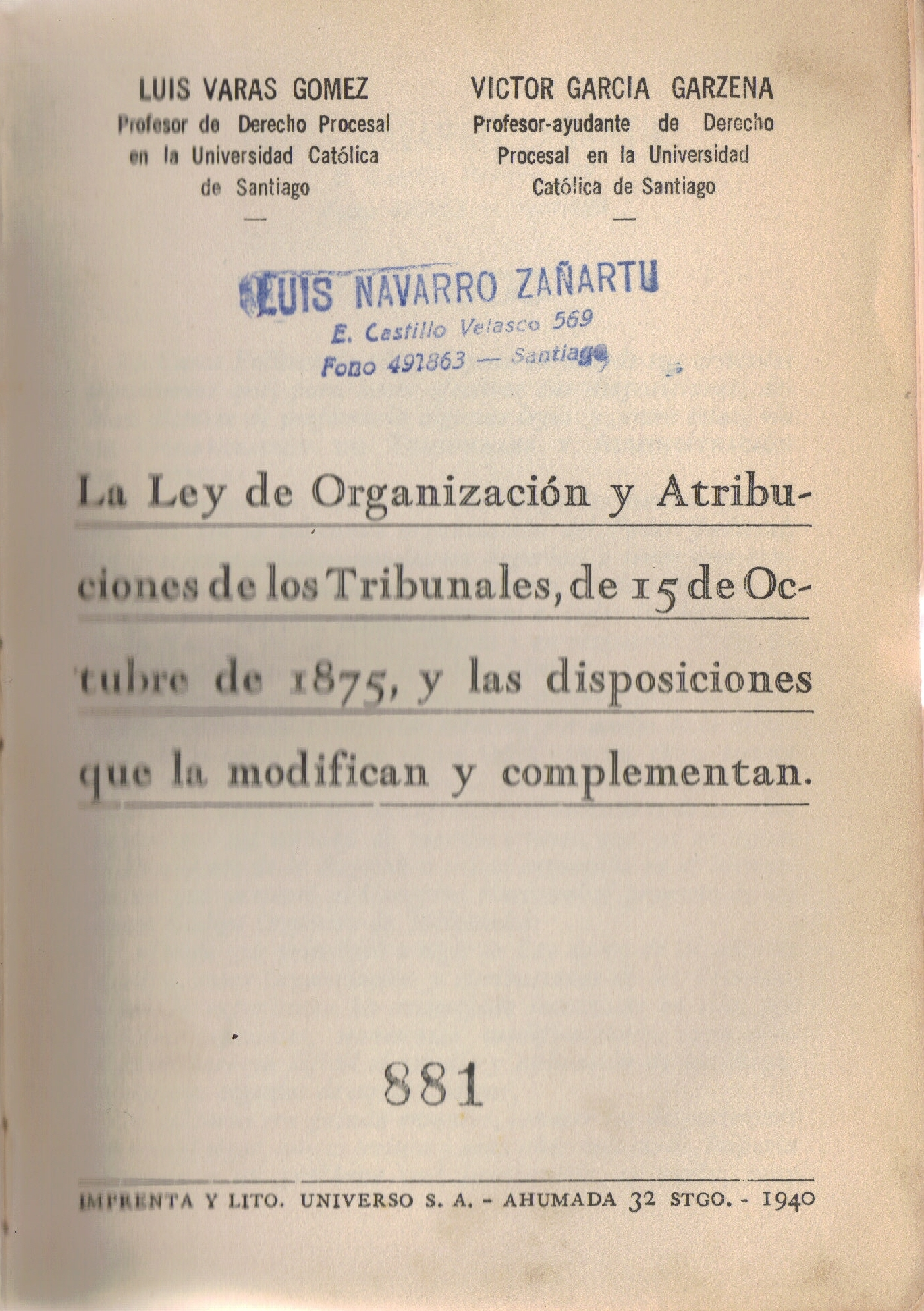 Portada de "La Ley de Organización y Atribuciones de los Tribunales, de 15 de octubre de 1875, y las disposiciones de que la modifican y complementan", de Luis Varas Gomez y Victor Garcia Garzena. Imprenta y Litografía Universo S.A. - Ahumada 32, Santiago de Chile